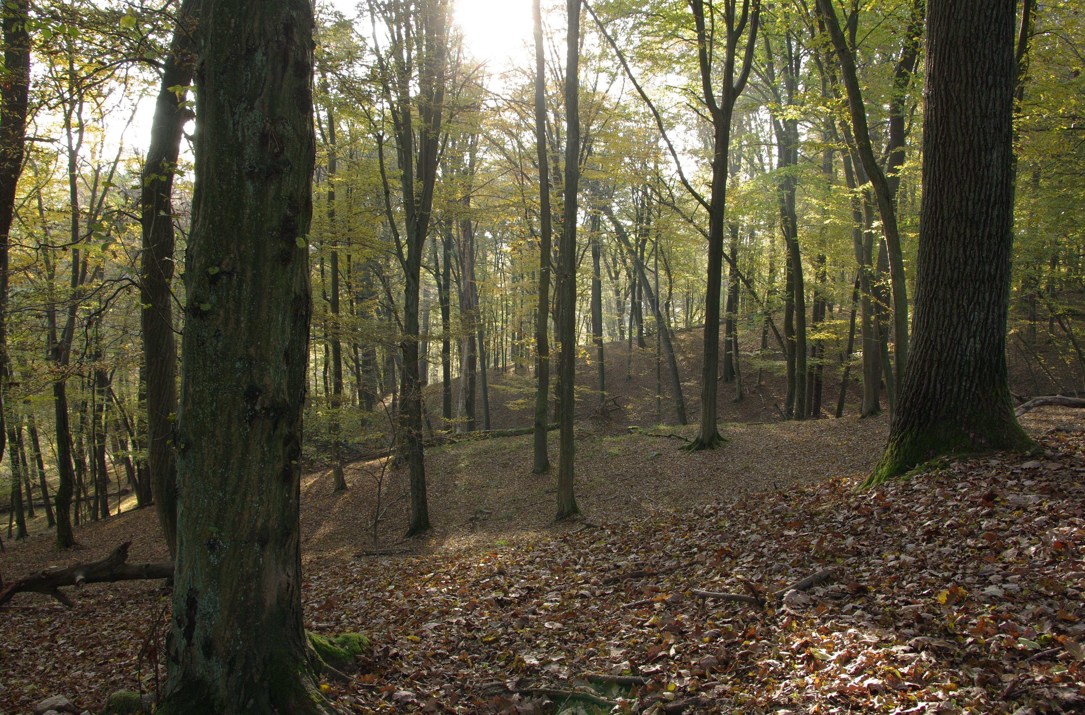 Naturnaher Eichen-Hainbuchenwald auf Moränenhängen am Rand einer eiszeitlichen Rinne im NSG und FFH-Gebiet "Blumenthal".